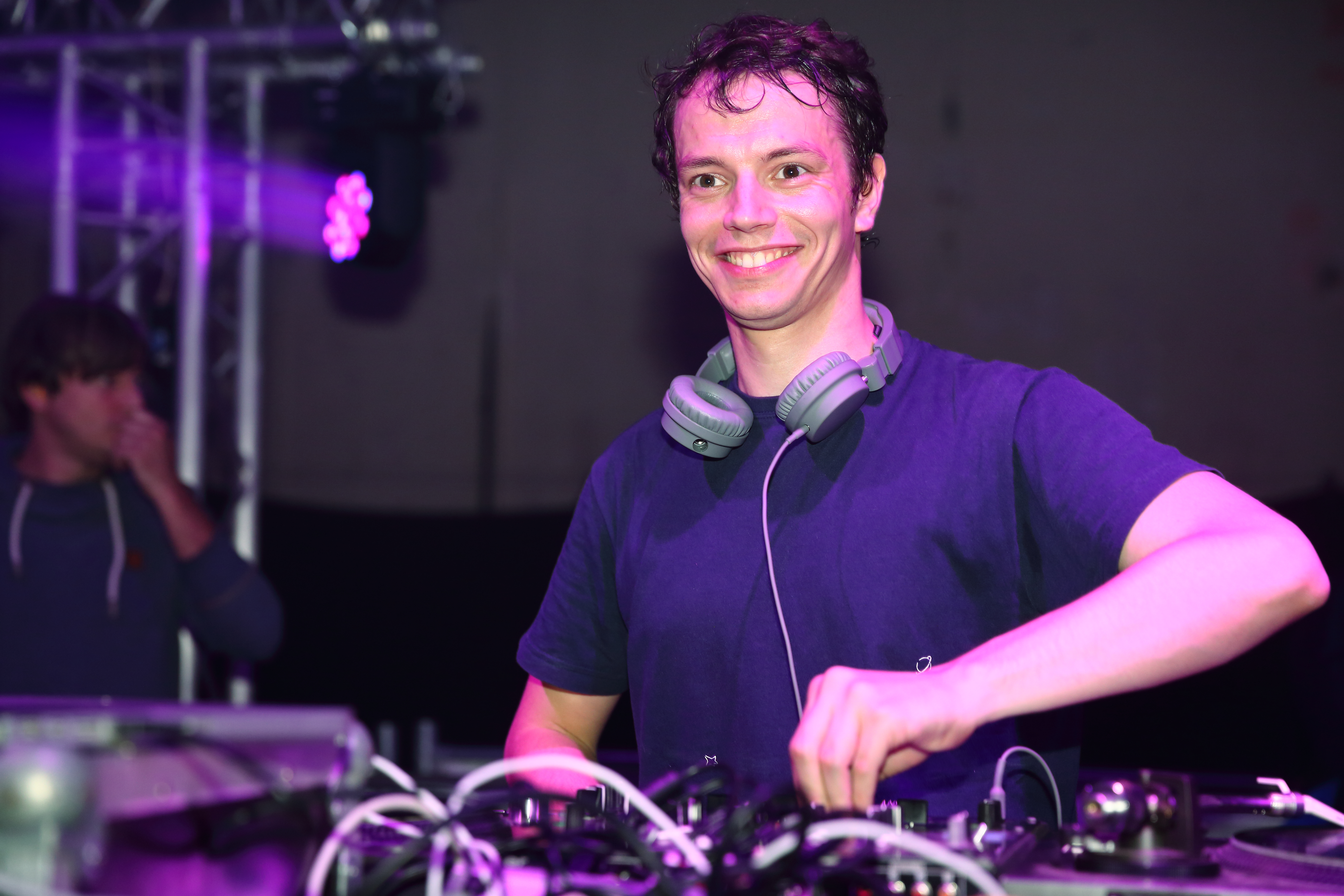 Alle Farben (DJ) auf dem Echelon 2014 Festivalsommer This photo was created with the support of donations to Wikimedia Österreich and Wikimedia Deutschland in the context of the CPB project "Festival Summer". For taking this photo and licensing it under a free licence a (press) accreditation was required. The photographer had a valid accreditation and has sent it to the email response team, it has been archived in the OTRS system. Users with OTRS account can access it here. Please be aware that (press) accreditations are a permission to generally take photos only and do not make any statement about the copyright status of this photo! Link to the ticket: Personality rights warningAlthough this work is freely licensed or in the public domain, the person(s) shown may have rights that legally restrict certain re-uses unless those depicted consent to such uses. In these cases, a model release or other evidence of consent could protect you from infringement claims.